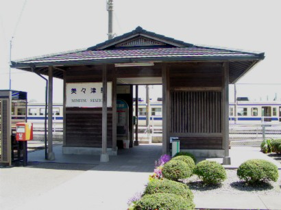 2005年3月31日に投稿者が美々津駅にて撮影。